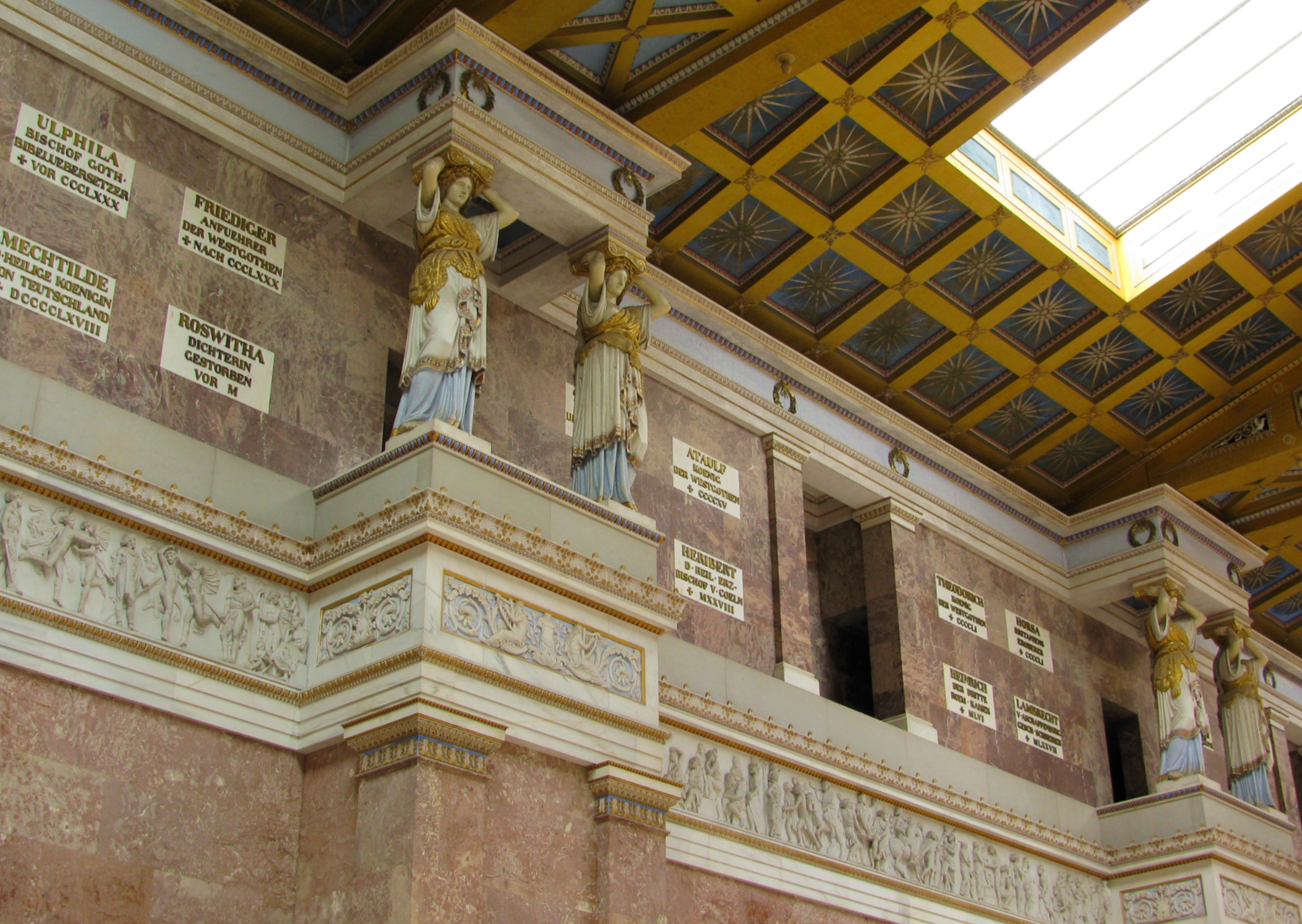 Innenansicht Walhalla (Empore)